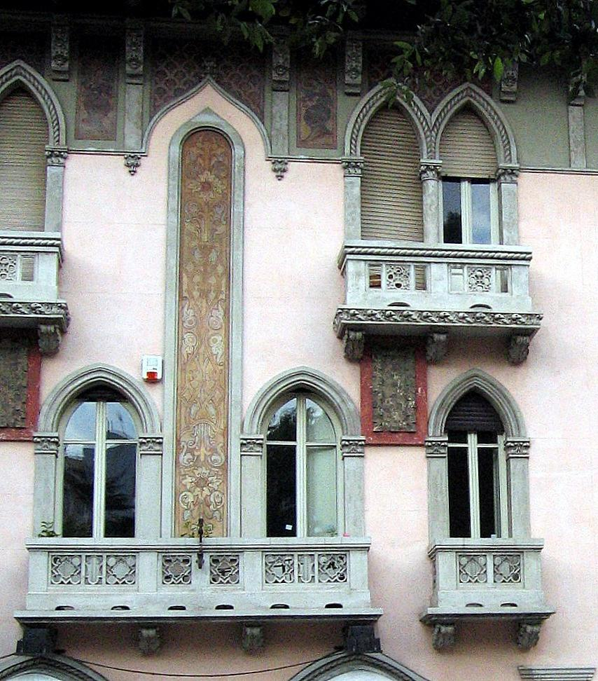 palace